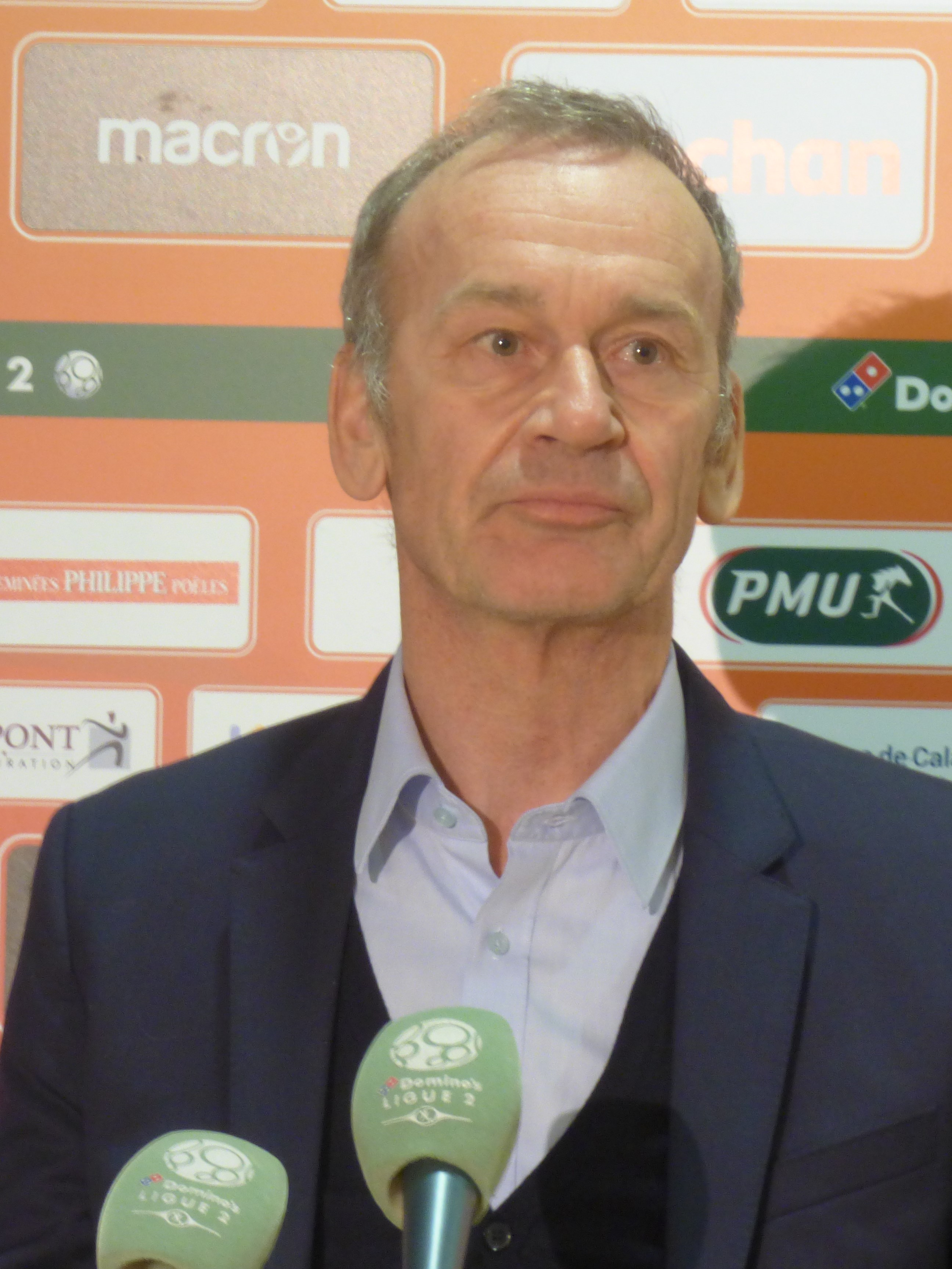 Jean-Marc Furlan après le match RC Lens / Stade brestois, le 4 décembre 2018, comptant pour la dix-septième journée du championnat de France de football de Ligue 2 2018-2019, au Stade Bollaert-Delelis.